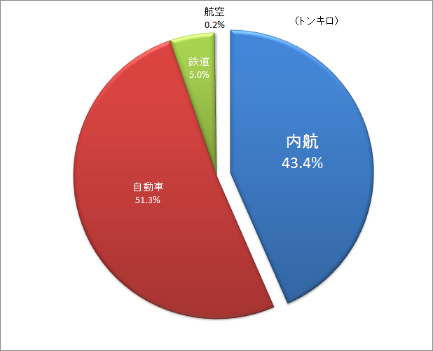 国内貨物輸送機関別シェア